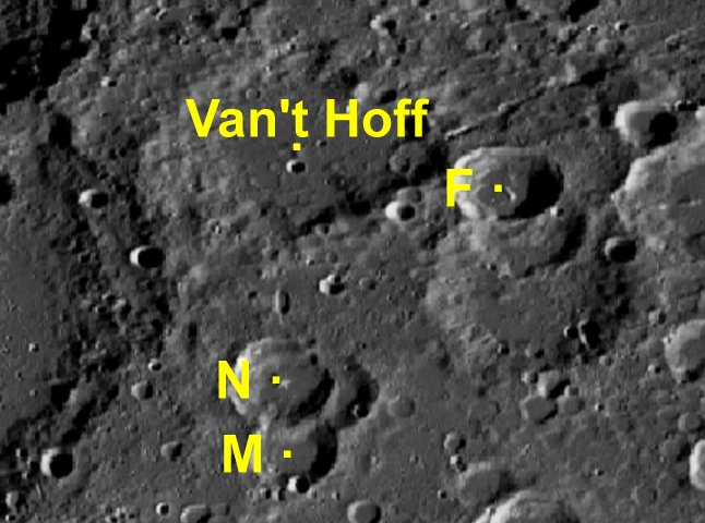 Cráter lunar Van'tHoff. Cráteres satélite. (Imagen LRO)